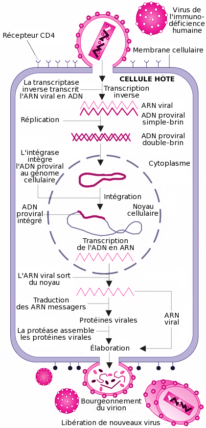 Cycle de réplication du VIH sans libellé